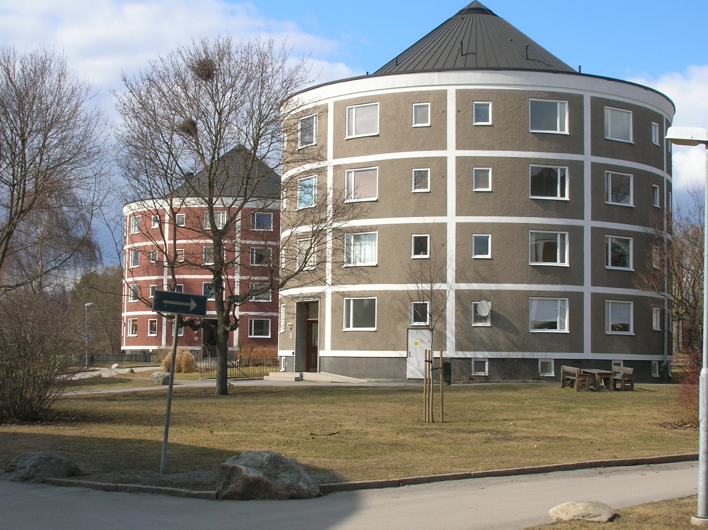 Runda hus i korsningen Bällstavägen/Spångavägen, Beckomberga, Stockholm